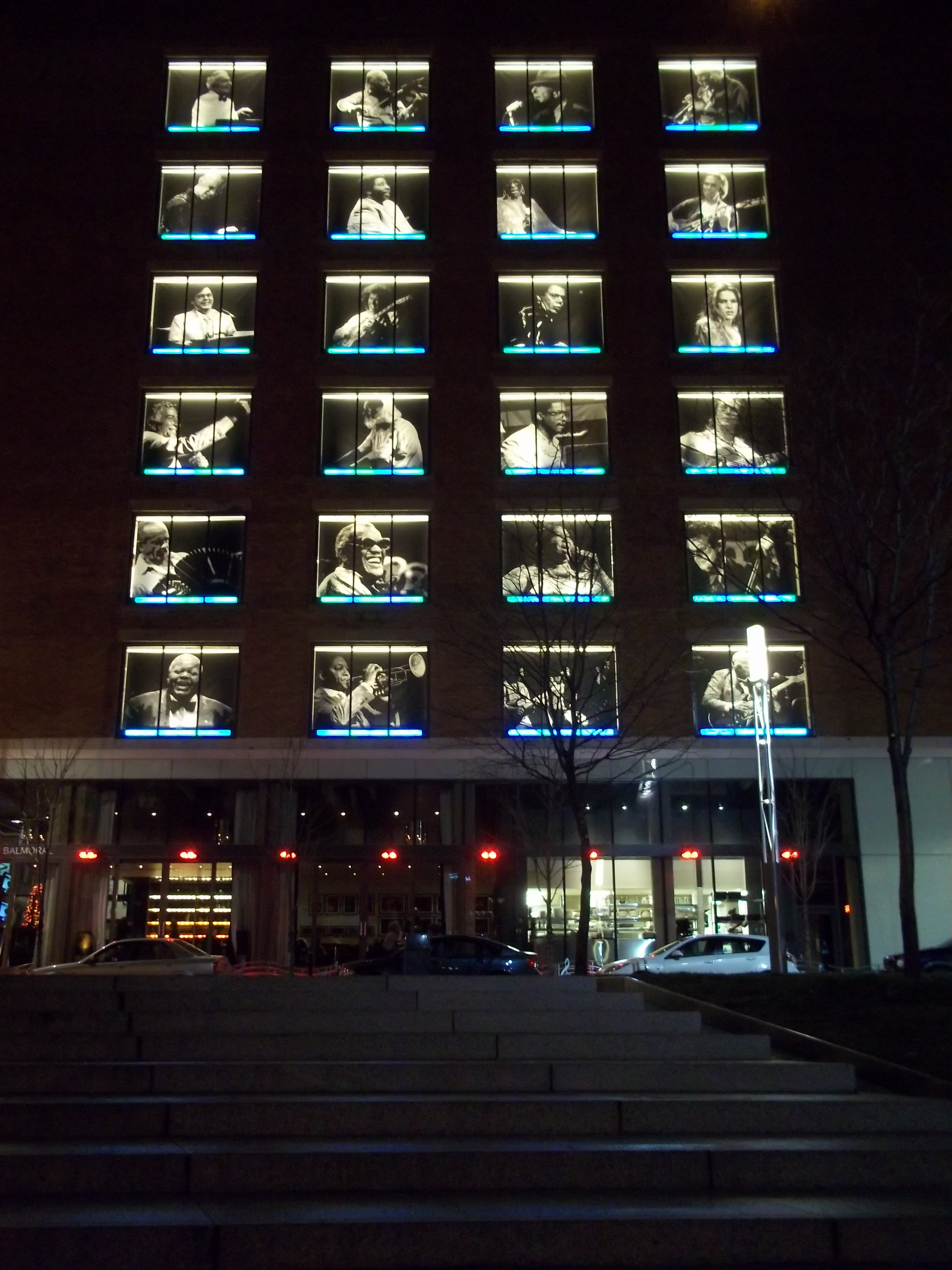 Maison du Festival de Jazz, côté Est, la nuit ; les fenêtres sont ornées de portraits de musiciens.